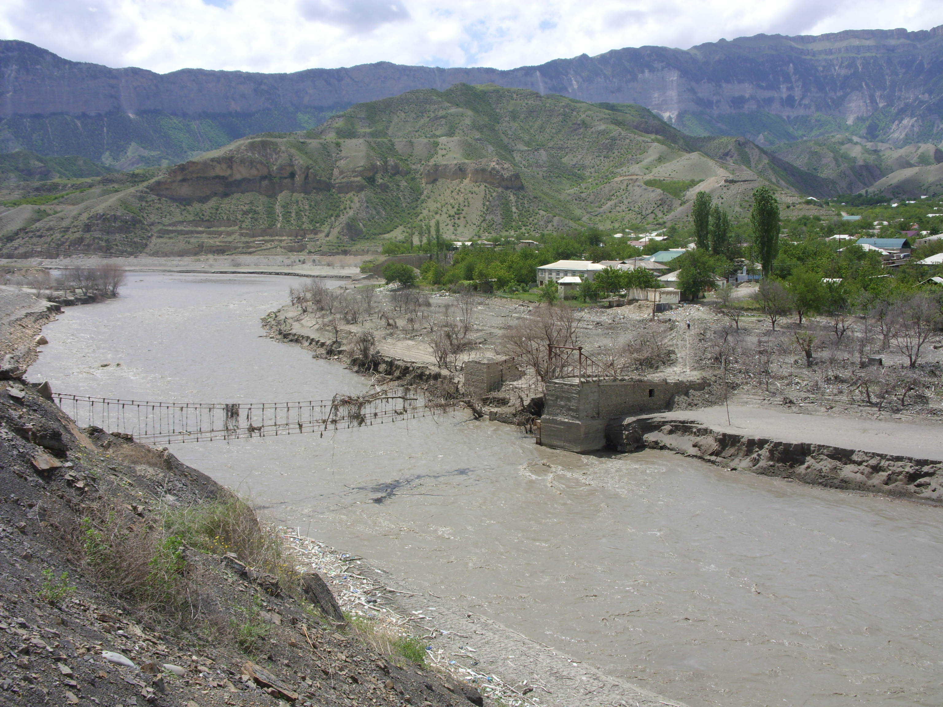 Ирганайское водохранилище у Балаханского моста